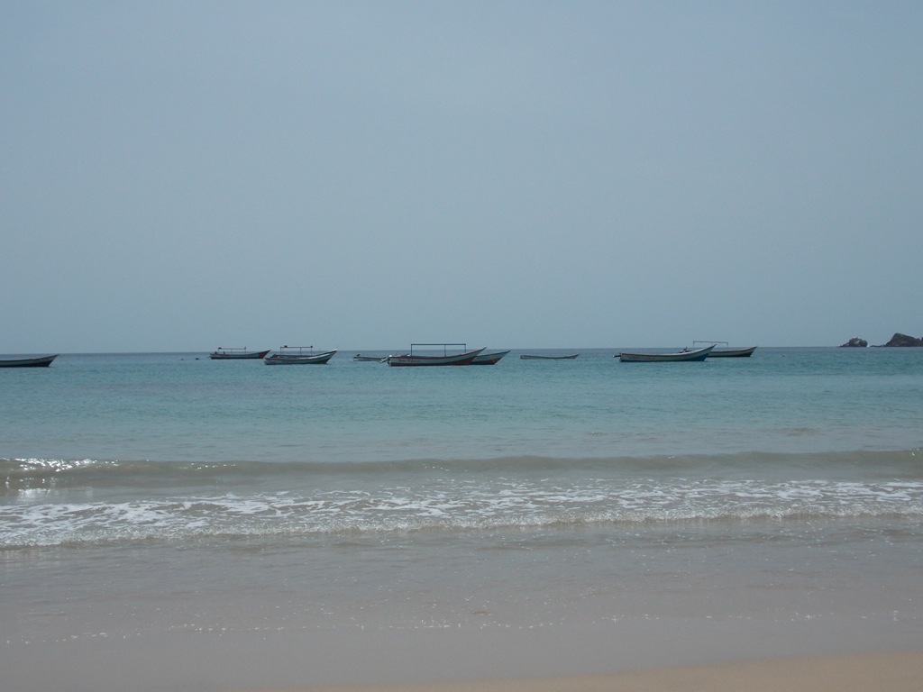 Playa Puerto Frances